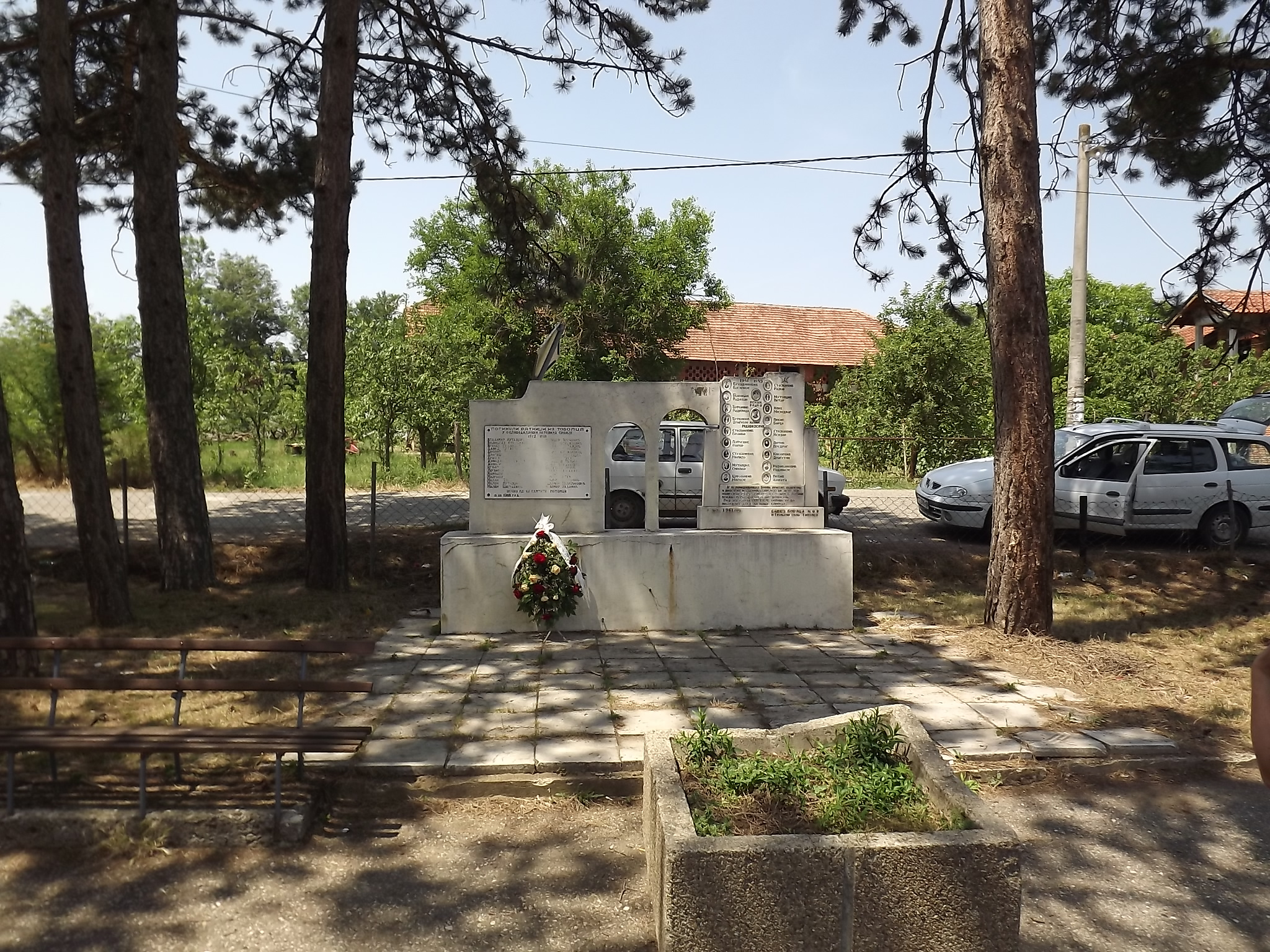 Srpski (latinica): Spomenik borcima u oslobodilačkim ratovima, selo Tobolac. Fotografija nastala u okviru saradnje Narodnog univerziteta Trstenik, Narodne biblioteke Jefimija i Saveza boraca Trstenik